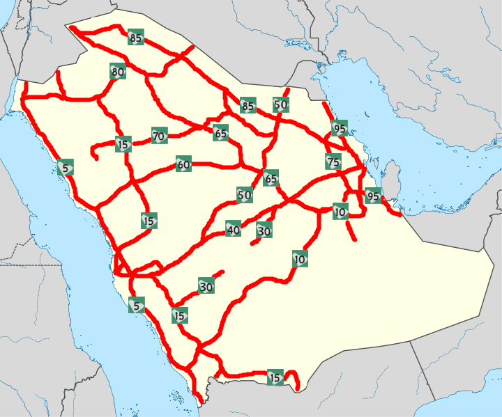 خارطة للطرق الرئيسية في السعودية والتي تتصل بشبكة خطوط المشرق العربي الدولية